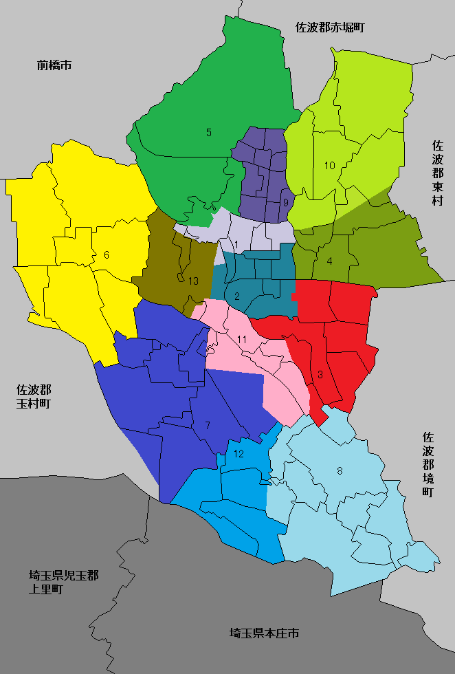 伊勢崎市の学区。